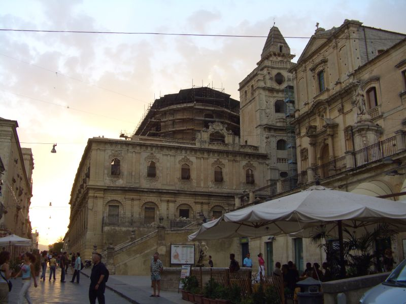 Il convento benedettino del Salvatore (1706, a sinistra) e la chiesa di San Francesco (1745, a destra) in Piazza dell'Immacolata Noto, Sicilia.